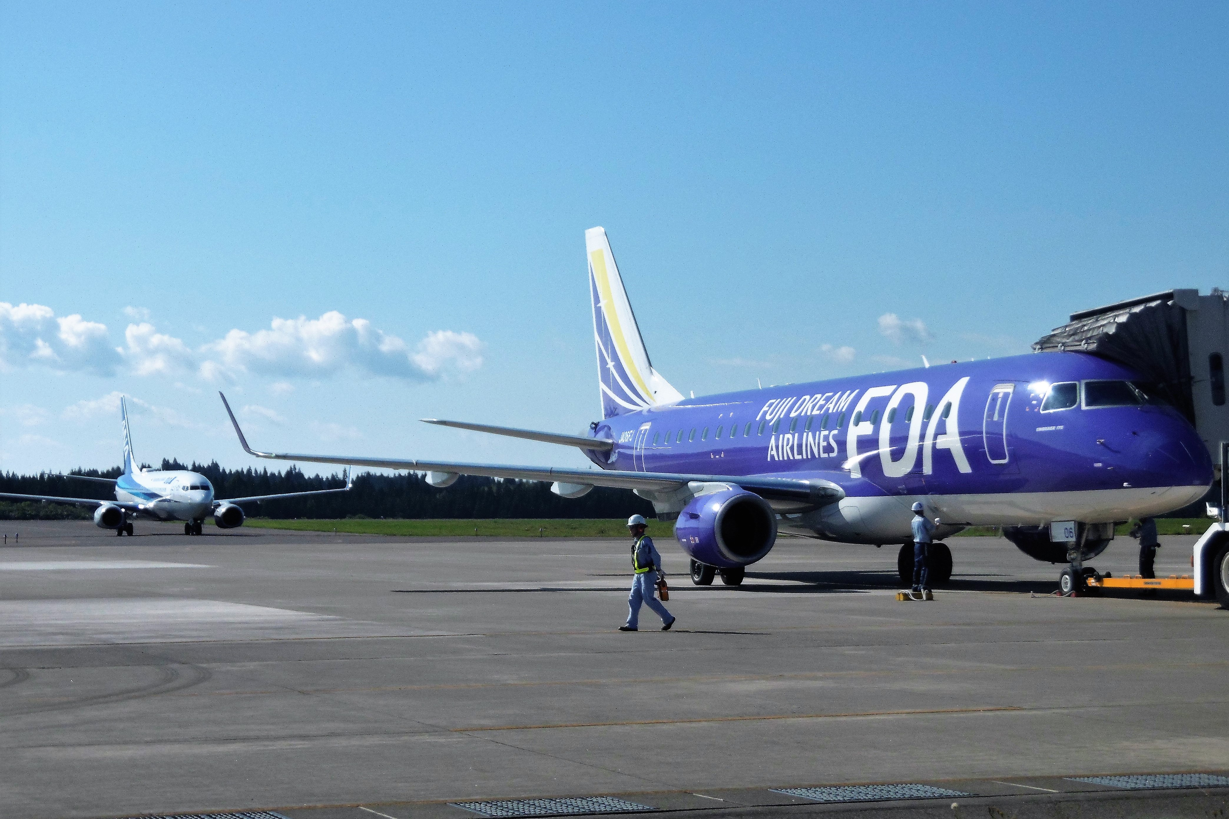 大館能代空港:ANA定期便とFDAのチャーター便 JA06FJ